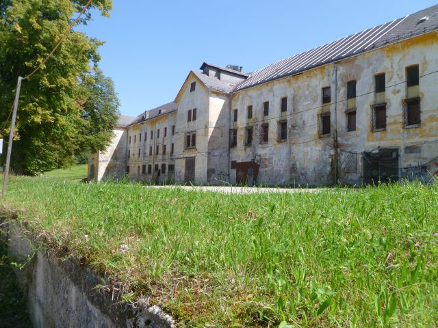 Gut Guggenthal Wirtschaftgebäude. Gemeinde Koppl.